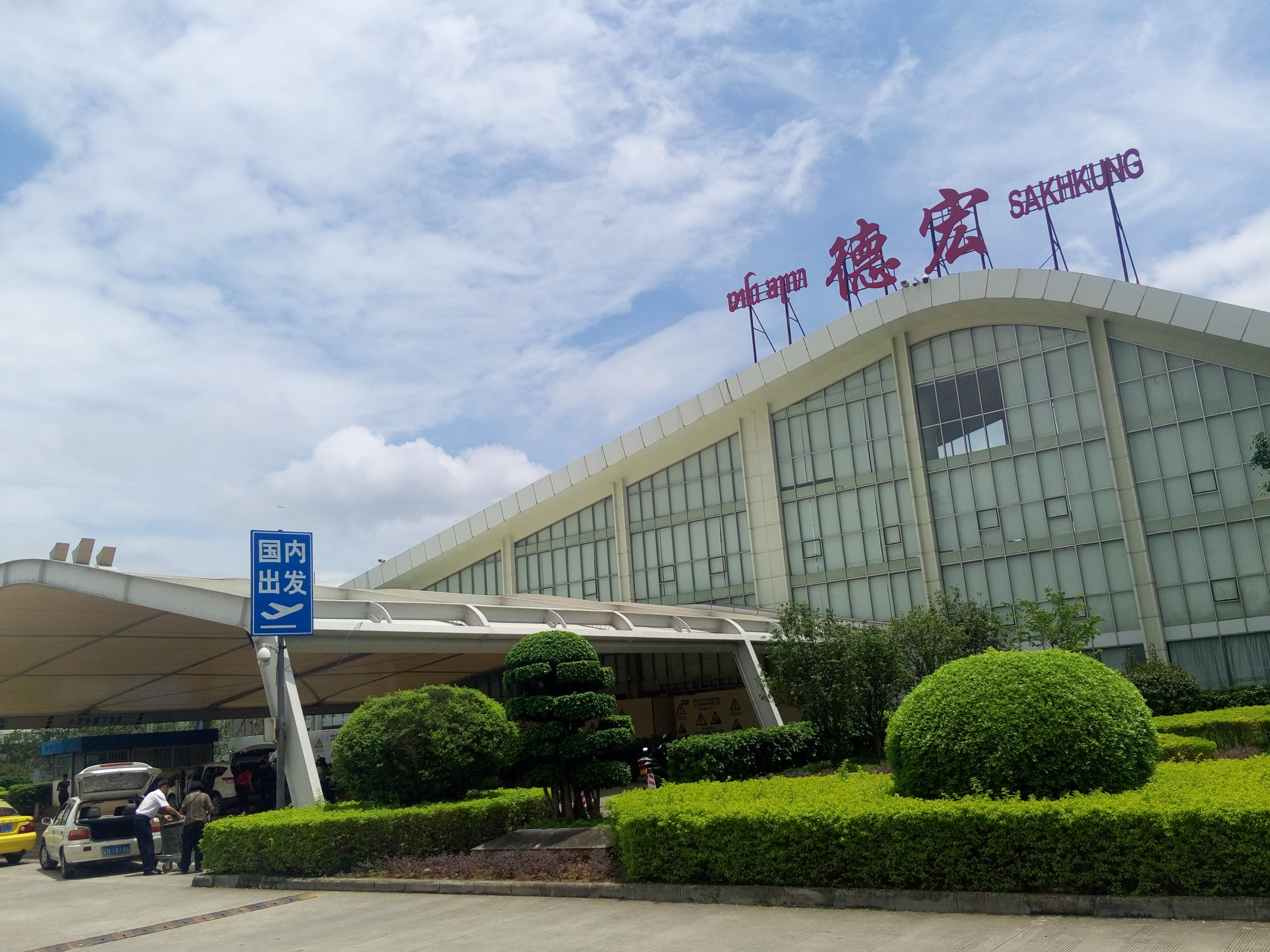 中文（中国大陆）: 德宏芒市机场航站楼国内出发口